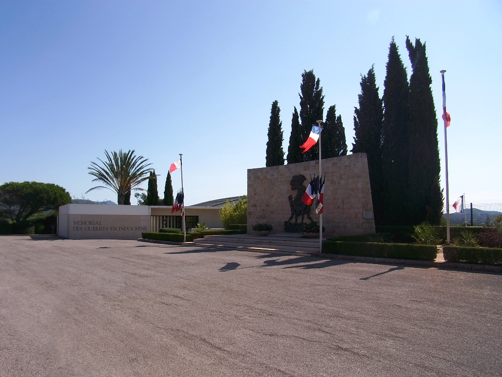 Mémorial des guerres d'Indochine (Fréjus)